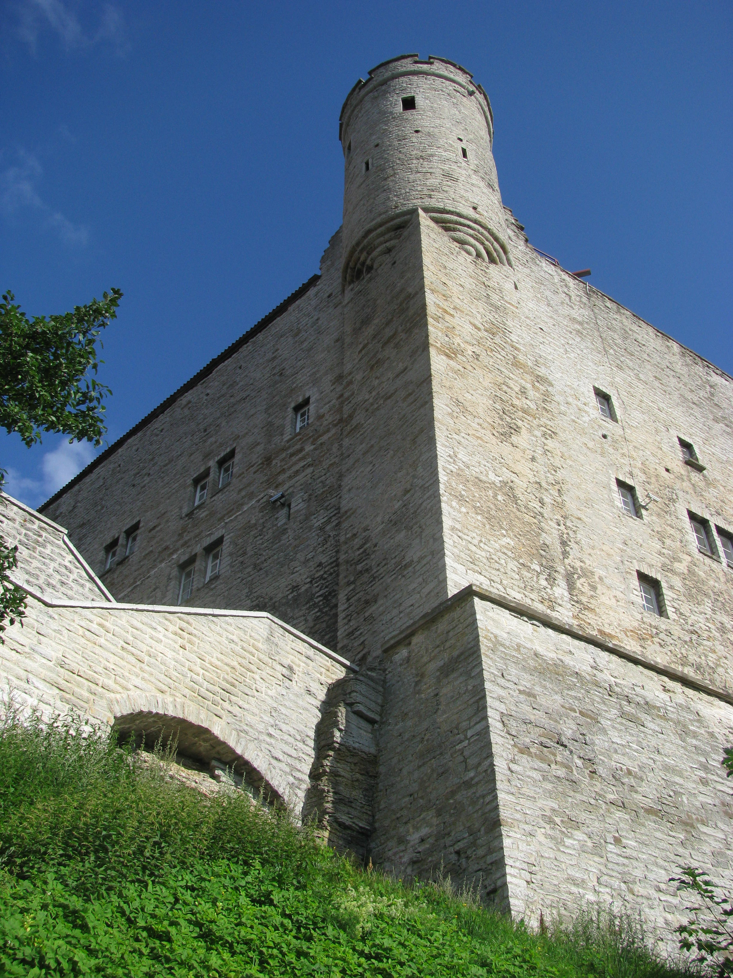 Pilstickeri torn Toompea lossis, vaade Toompuiestee poolt.